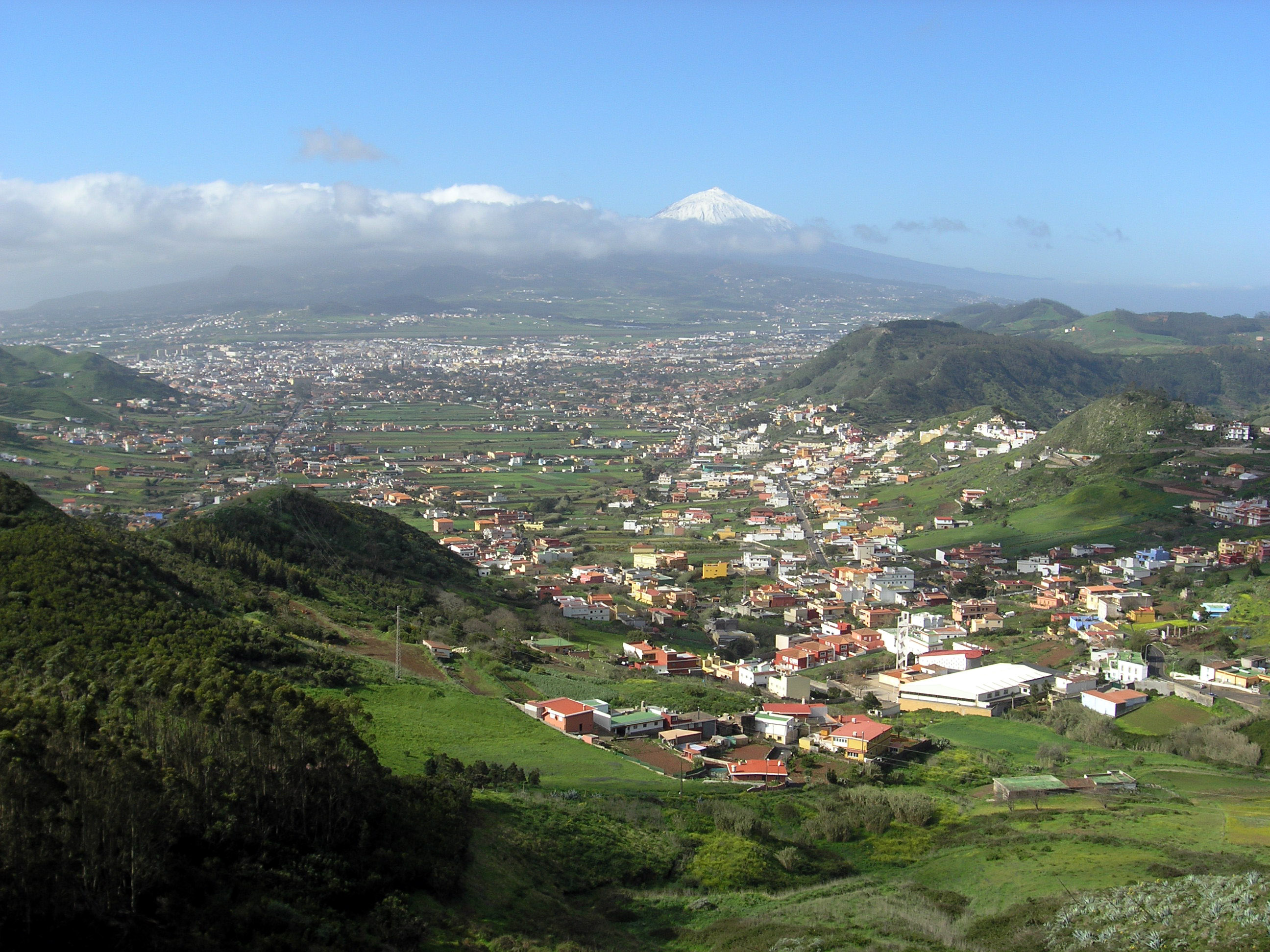 view on La Laguna, Tenerife